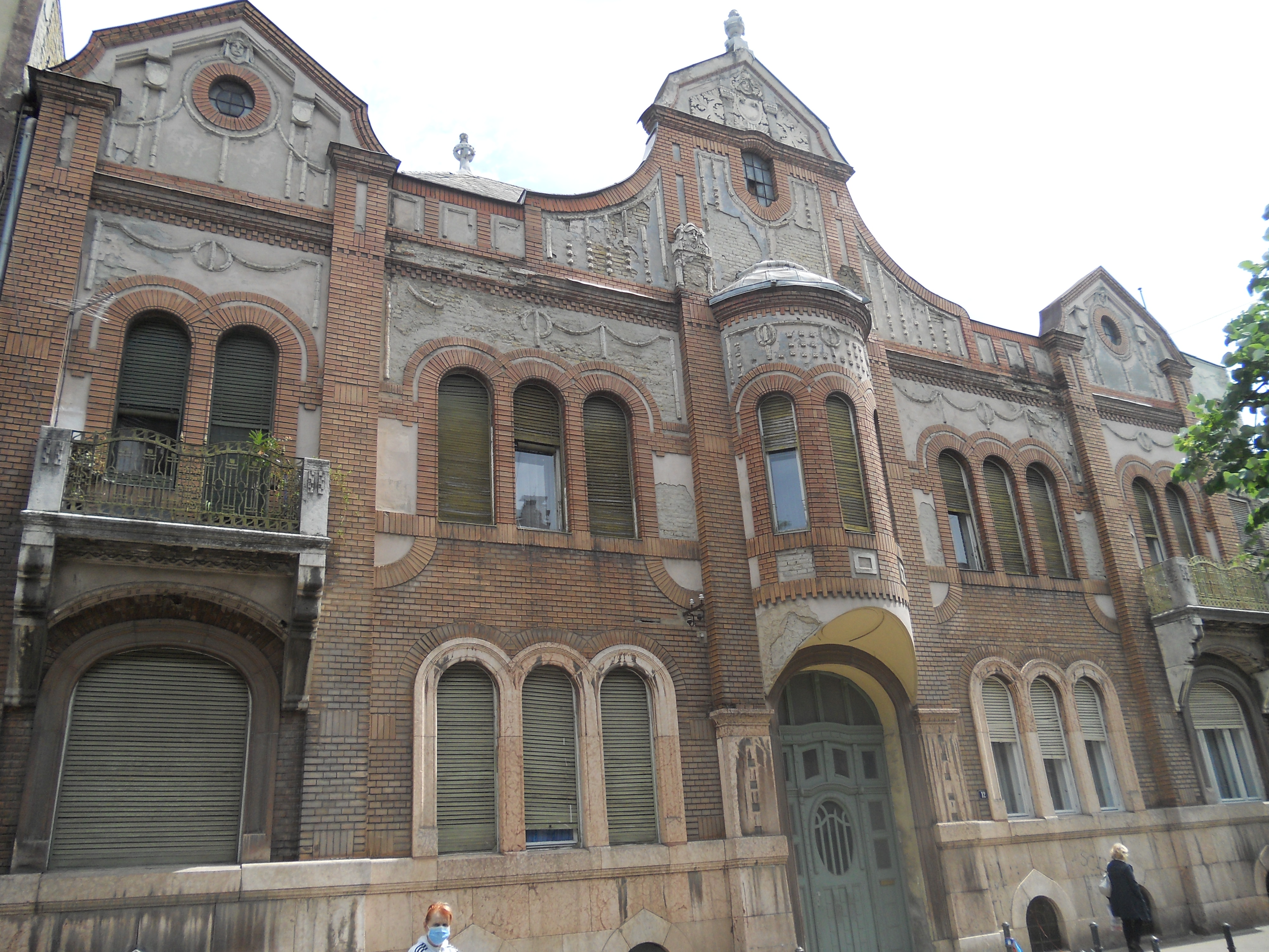 Trg Marije Trandafil